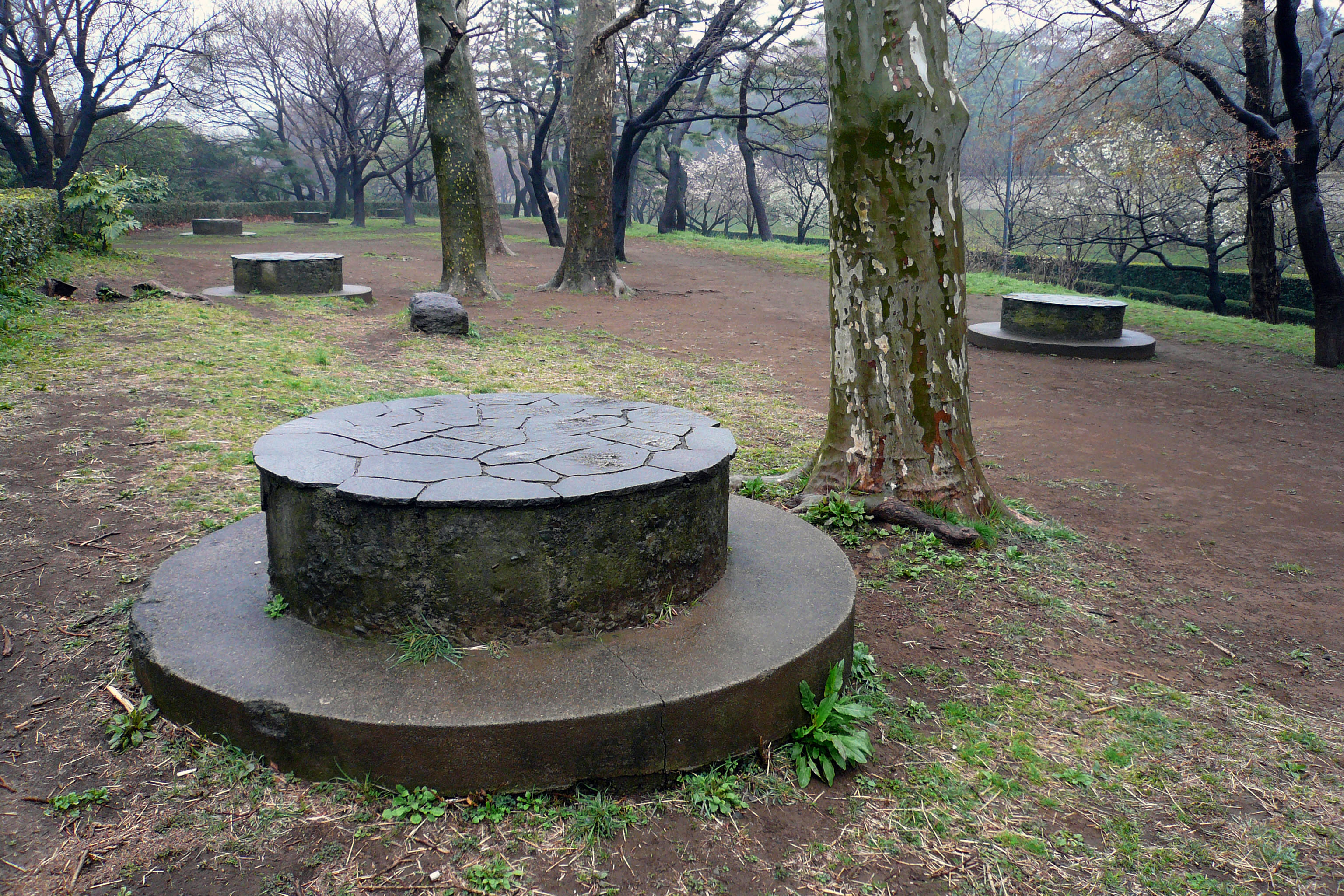 Kitanomaru park in Chiyoda-ku, Tokyo, Japan